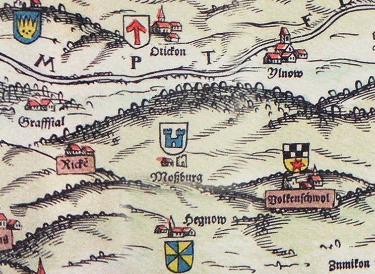 Moosburg Effretikon auf der Kantonskarte von Jos Murer von 1566